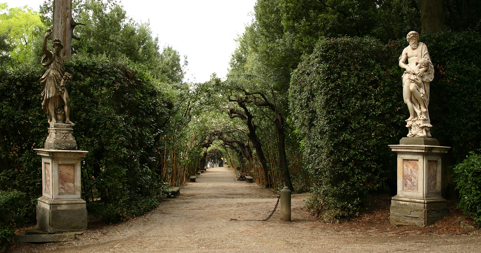 Skulpturen im Boboligarten in Florenz